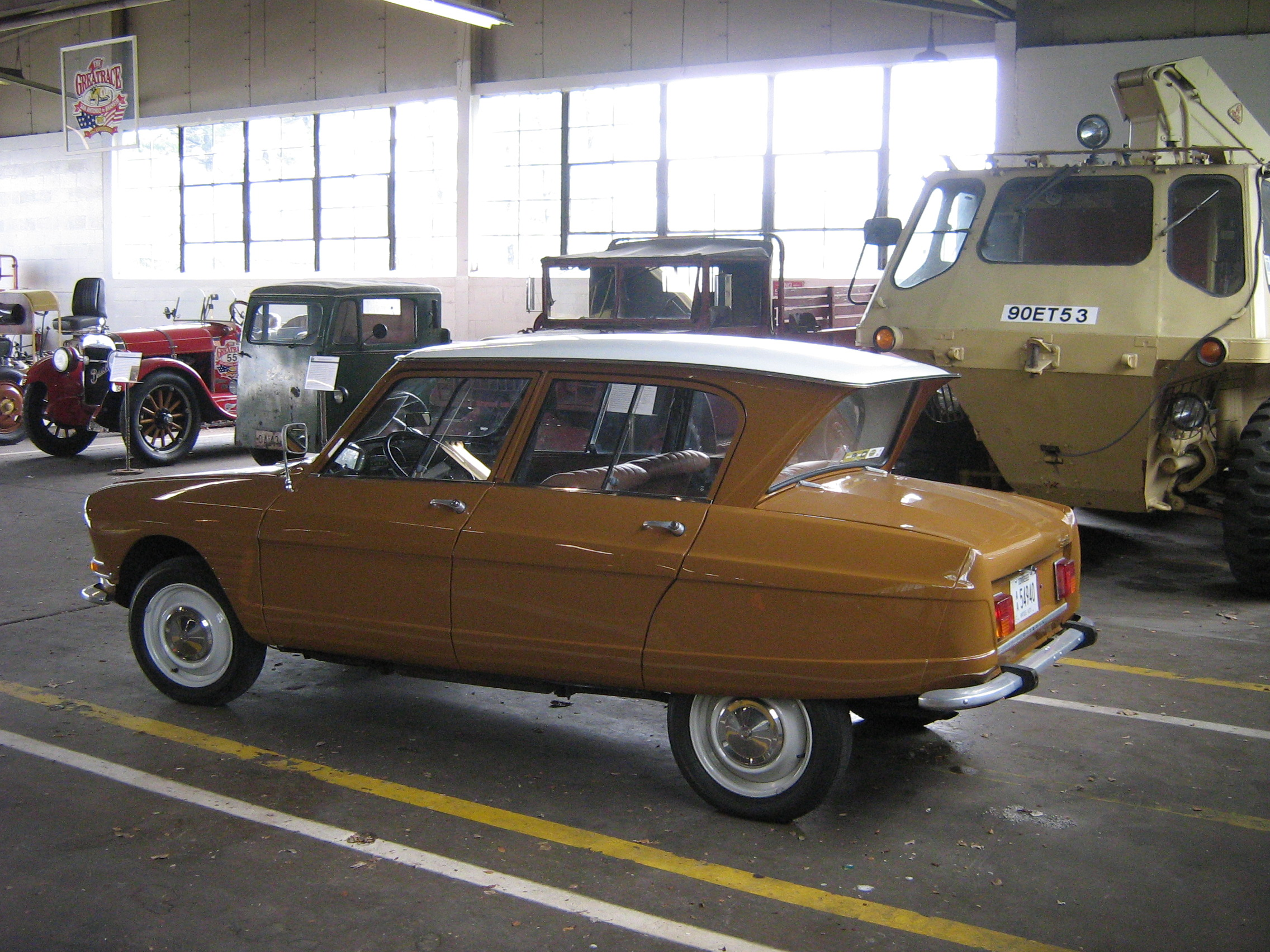 Citroën